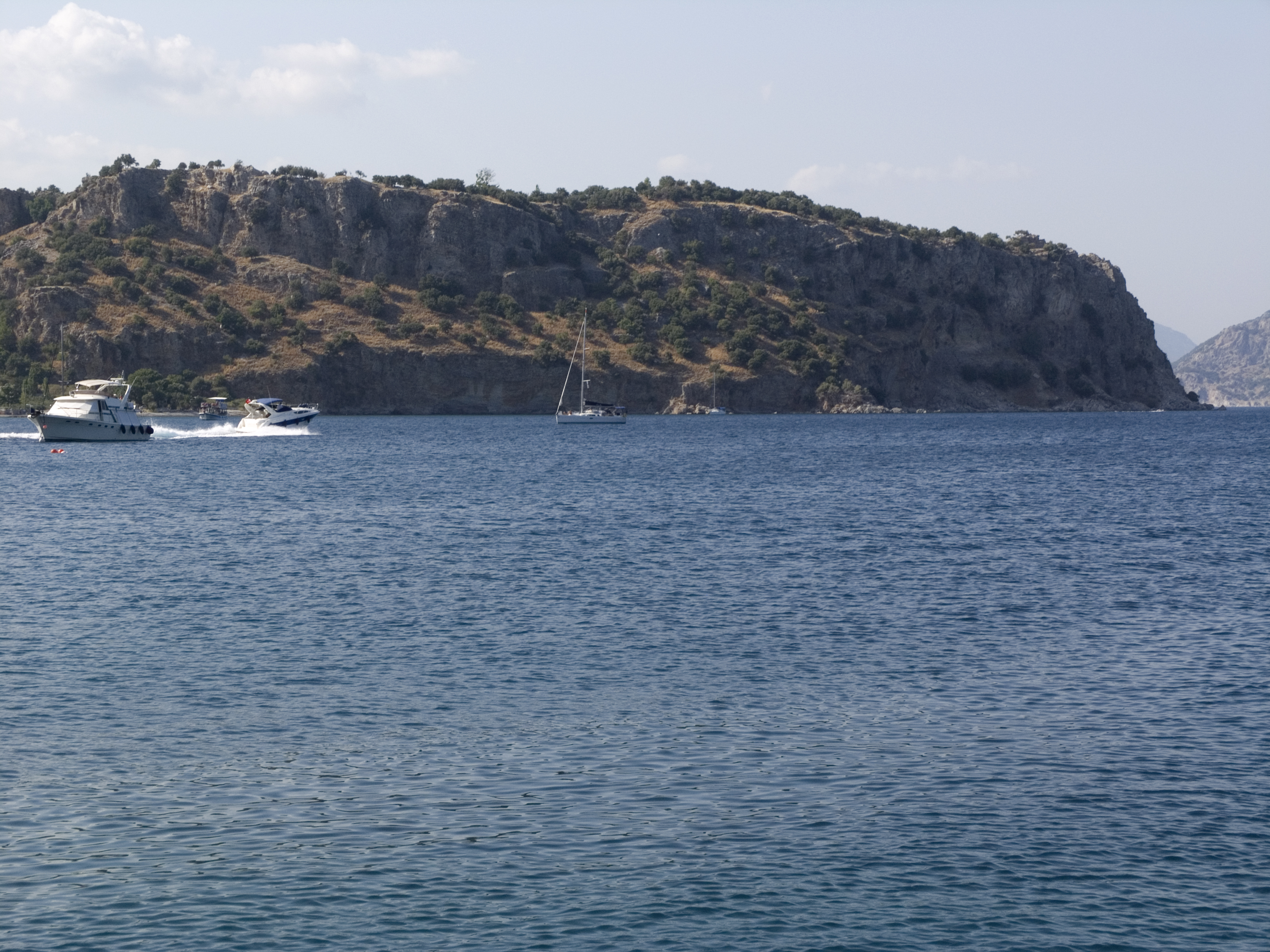 Турция – мыс над бухтой Кумлубук, на котором находится древний город Амос